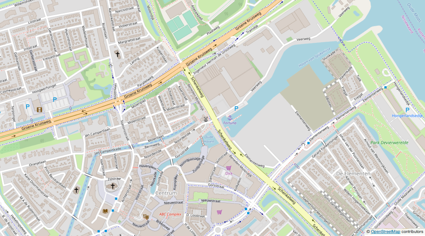 Kaart haven Spijkenisse 2019 This map may be incomplete, and may contain errors. Don't rely solely on it for navigation.